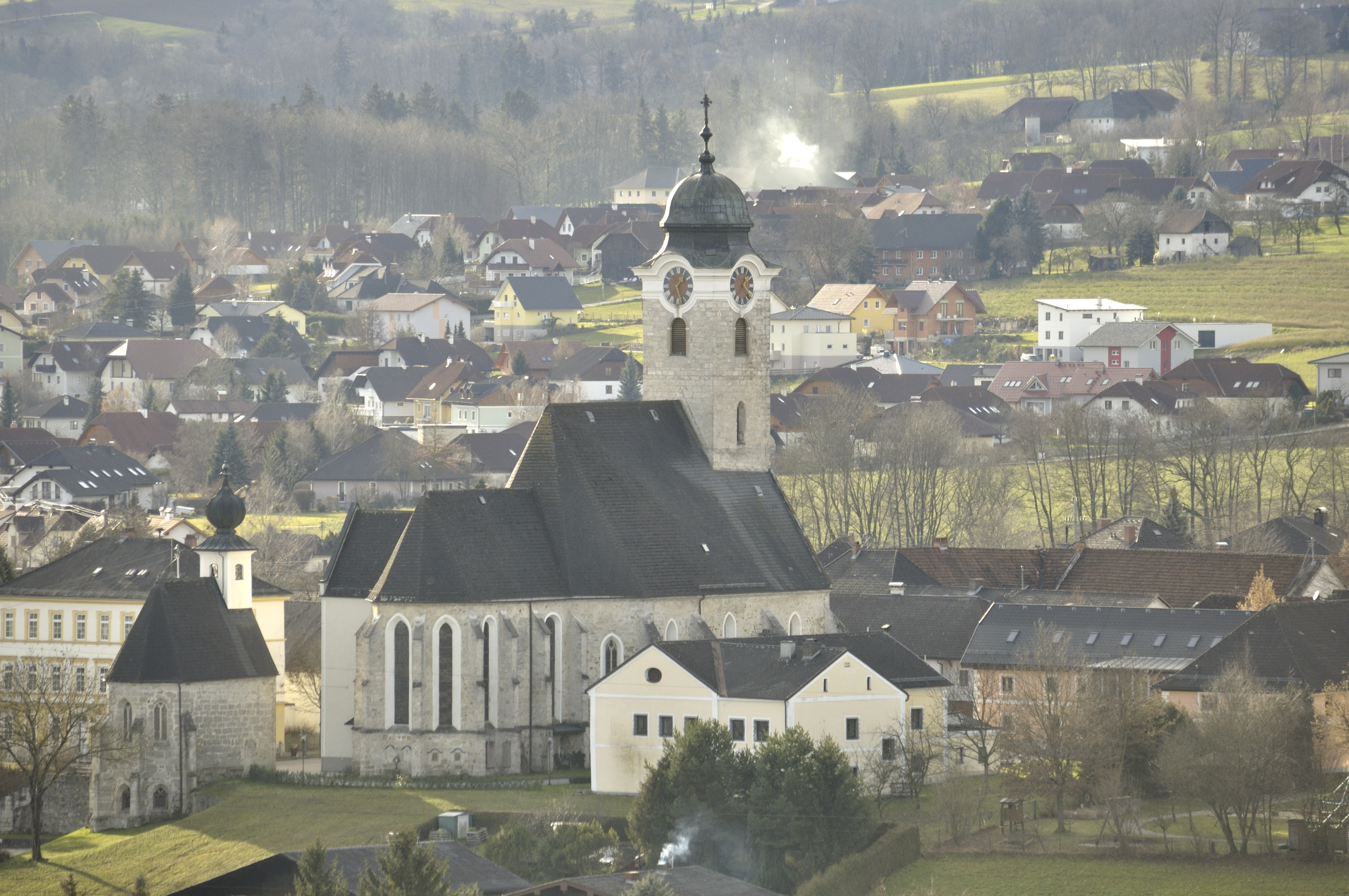 Kath. Pfarrkirche hl. Kilian